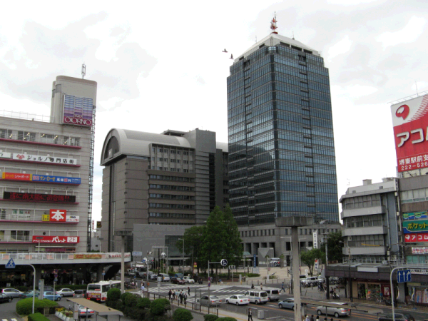 Sakai City Hall in Osaka-fu, Japan